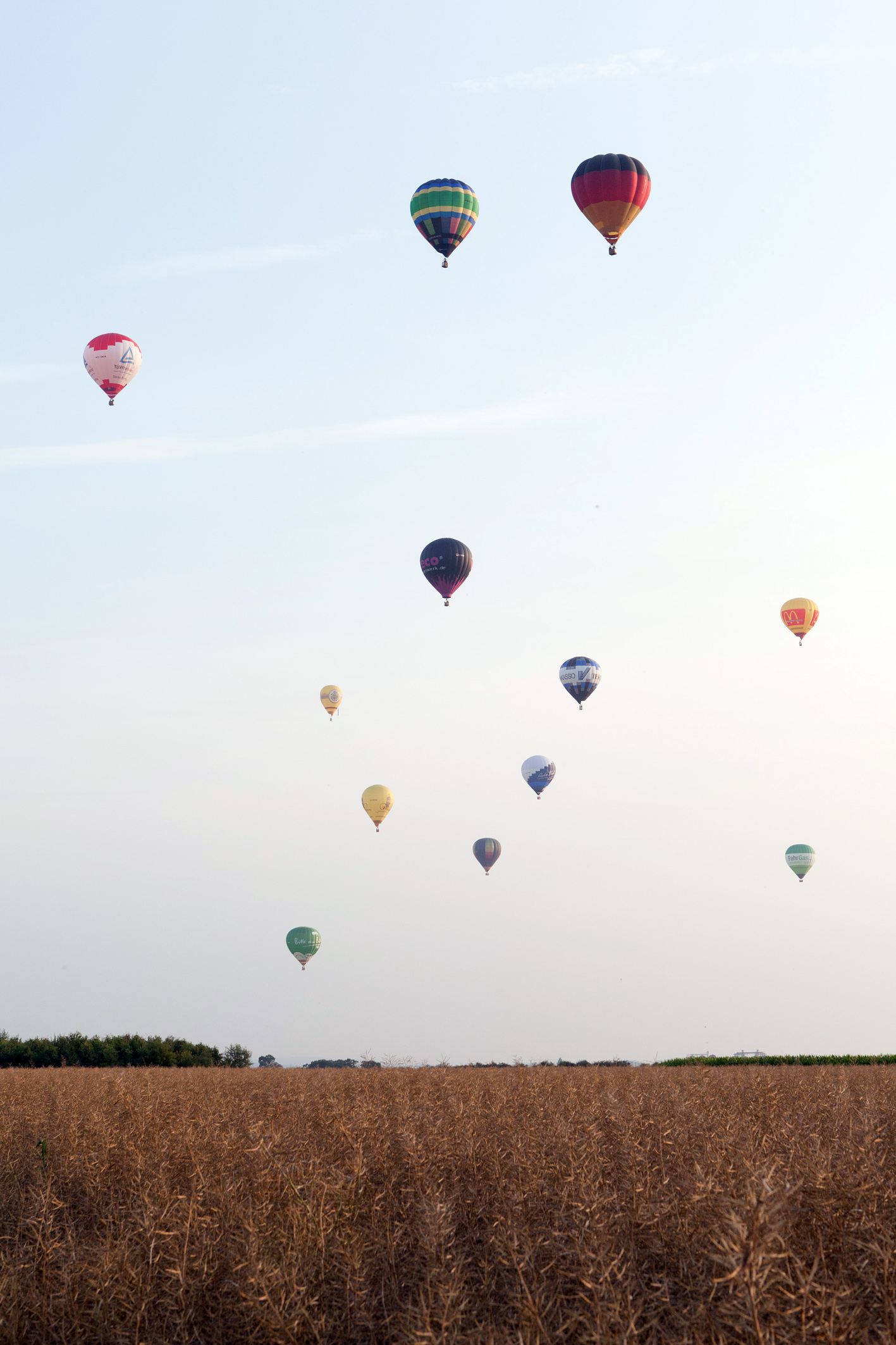 12 Heißluftballons schweben über den Süden von Köln und symbolisieren wie viel CO2 die Erweiterung des Godorfer Hafens täglich spart. Quelle